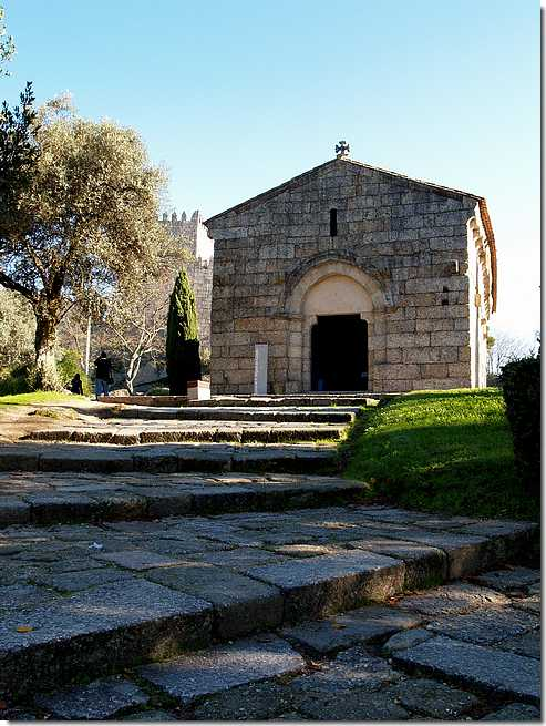 Église du São Miguel do Castelo, près du château.